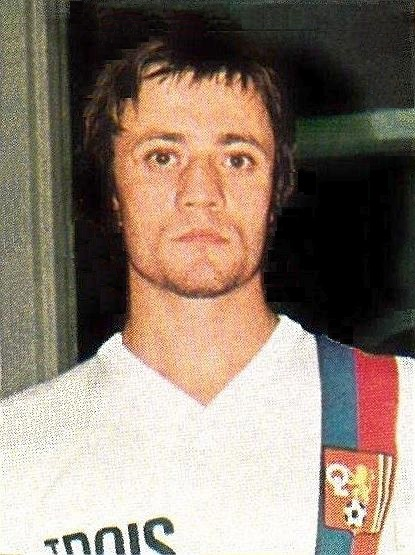 Bernard Lacombe en 1977 (Olympique lyonnais), Euro 77 Panini n°107.